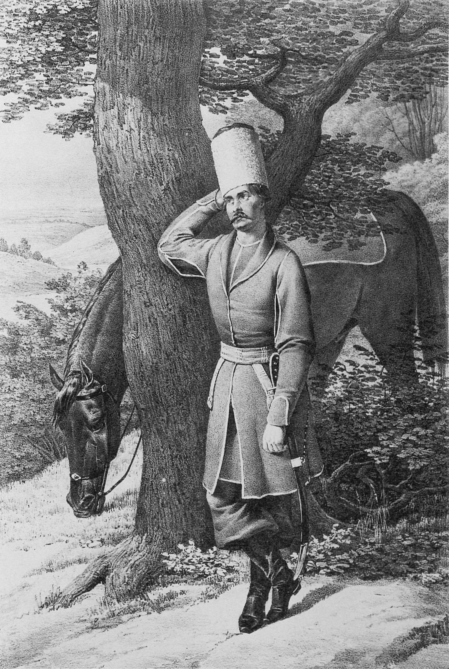 Волгский Козак 1774 года. Данная картинка была также использована в статье «Волгское казачье войско» опубликованной в шестом томе «Военной энциклопедии», который был издан книгоиздательским товариществом Ивана Дмитриевича Сытина в 1912 году в столице Российской империи городе Санкт-Петербурге.